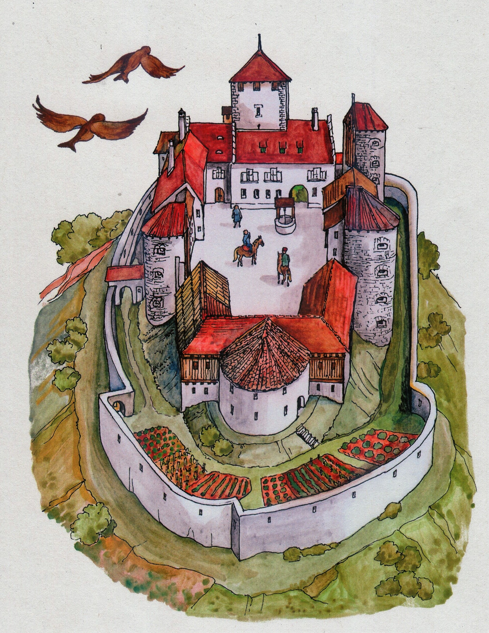 Küssaburg im Landkreis Waldshut in Baden-Württemberg. Historische Darstellung der Burg um 1529. Zeichnung von Wolf Pabst.